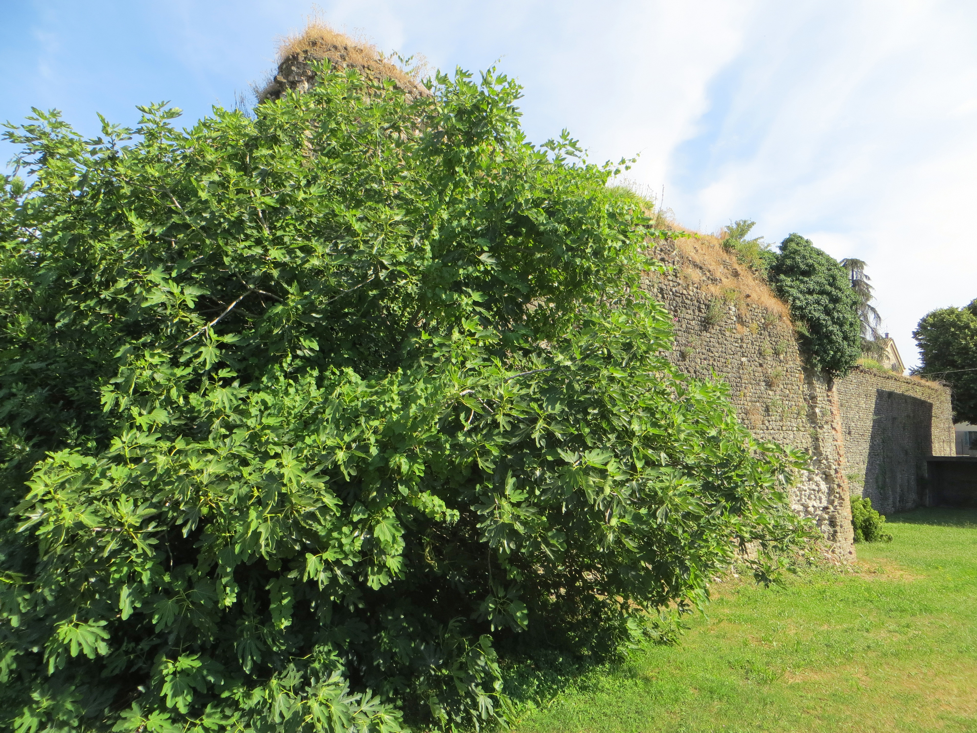 Mura cittadine (Montechiarugolo) - rivellino nord-ovest